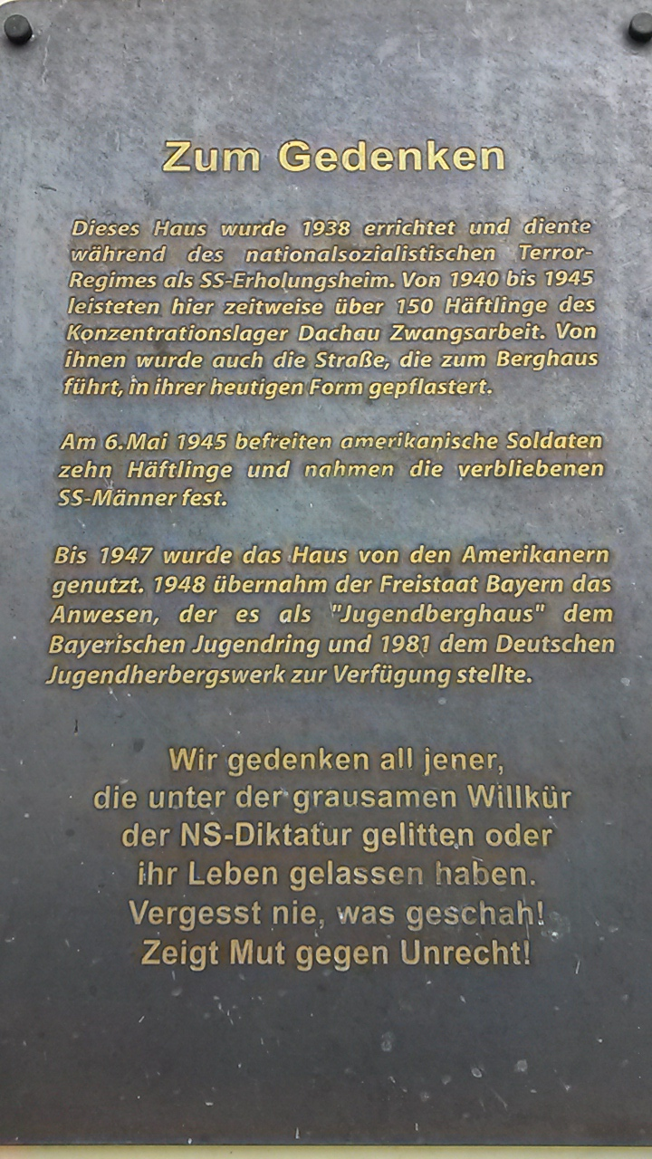 Gedenktafel am ehemaligen SS-Berghaus des KZ-Außenlagers Dachau am Oberen Sudelfeld in der Nähe von Bayrischzell, Bayern, Deutschland. Über 150 KZ-Häftlinge (Jehovas Zeugen) mussten hier Zwangsarbeit verrichten. Heute befindet sich in diesem Haus, das 1938 erbaut wurde, eine Jugendherberge. Foto aufgenommen am 2015-09-20.